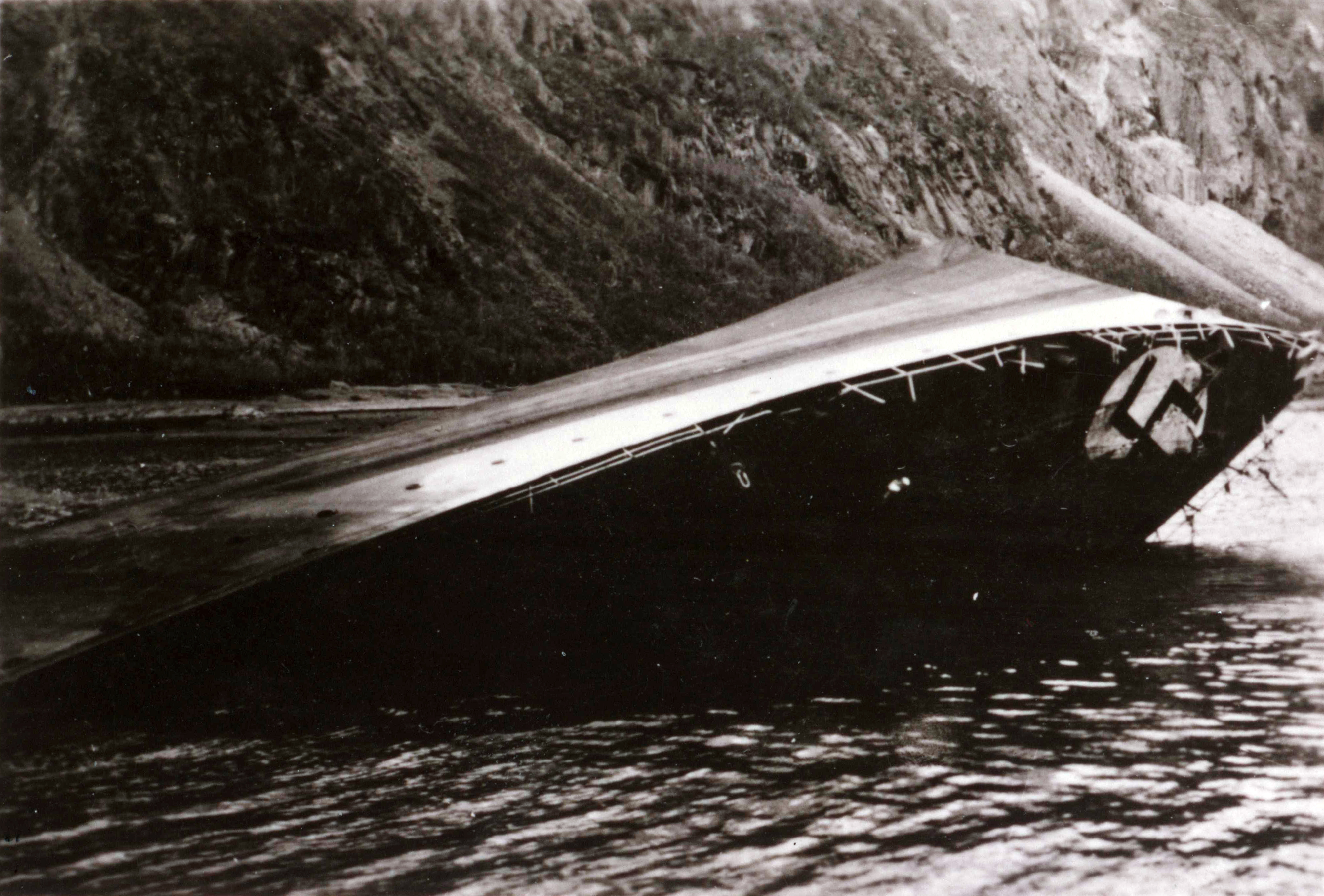 Tysk destroyer i Rombakken etter kampene om Narvik Tittel / Title: Tysk skipsvrak etter kampene om Narvik Dato / Date: Juni 1940 Fotograf / Photographer: Franz Hollerweger Sted / Place: Narvik, Nordland, Norge Eier / Owner Institution: Arkiv i Nordland Lenke / Link: Arkiv i Nordland Arkivreferanse /Archive reference: AIN.NA143.0050 Fra Dag Skogheims Privatarkiv Tekst bak på bildet: Narvik-Narvik- Narvik 1940! Deutscher Zerstörer im Rombakkenfjord- Am Bug das Hakenkreuz zur Fliegerorienterung, ein Omen des Unterganges der Gewalt? Text on the back of picture: Narvik - Narvik - Narvik 1940! German destroyer in Rombak Fjord. In the bow is the swastika for orientation for pilots, a omen for the end of violence?